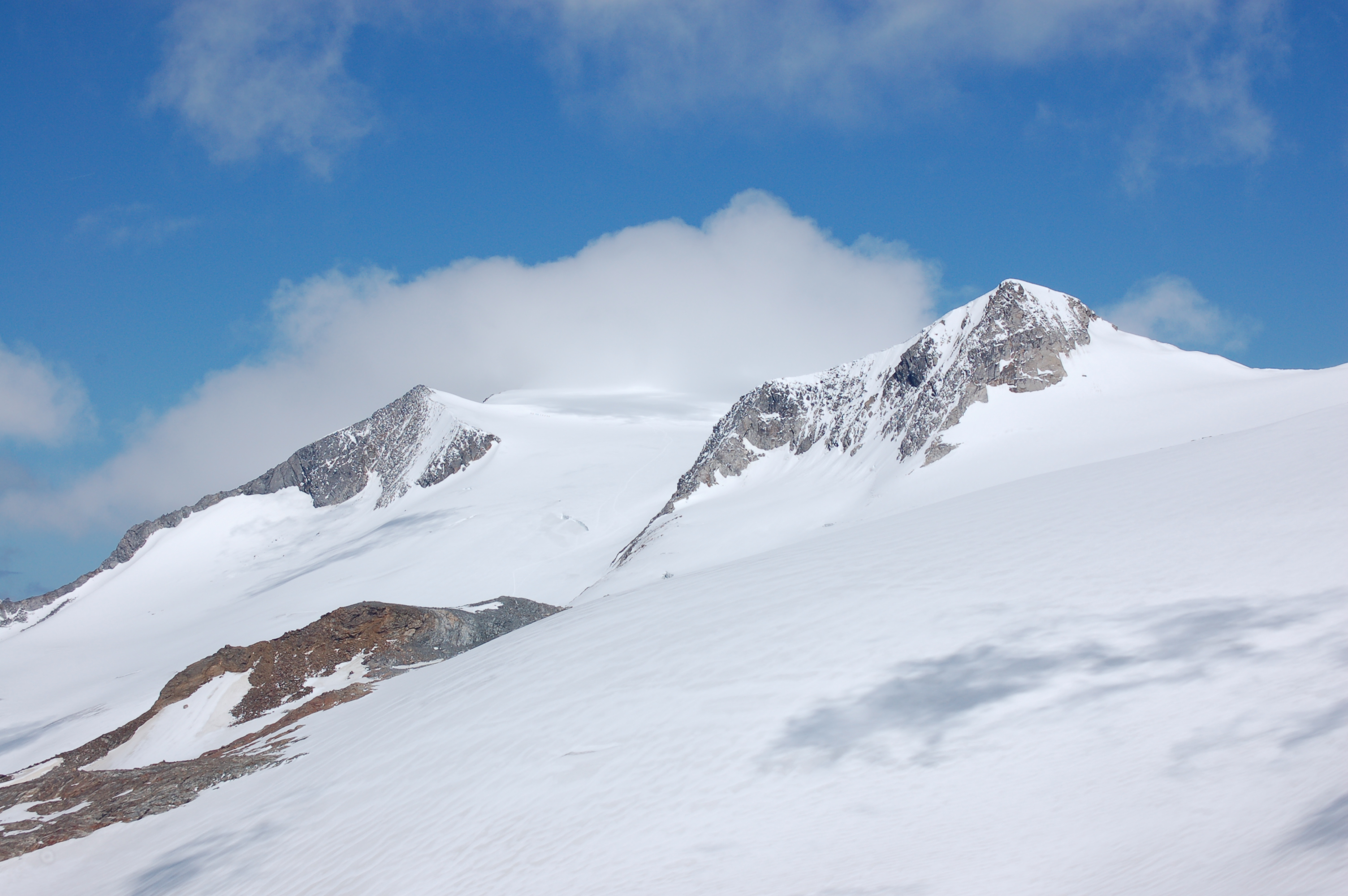 Hohes Aderl und Rainerhorn gesehen von der Weißspitze. This file shows the National Park Hohe Tauern in Austria.